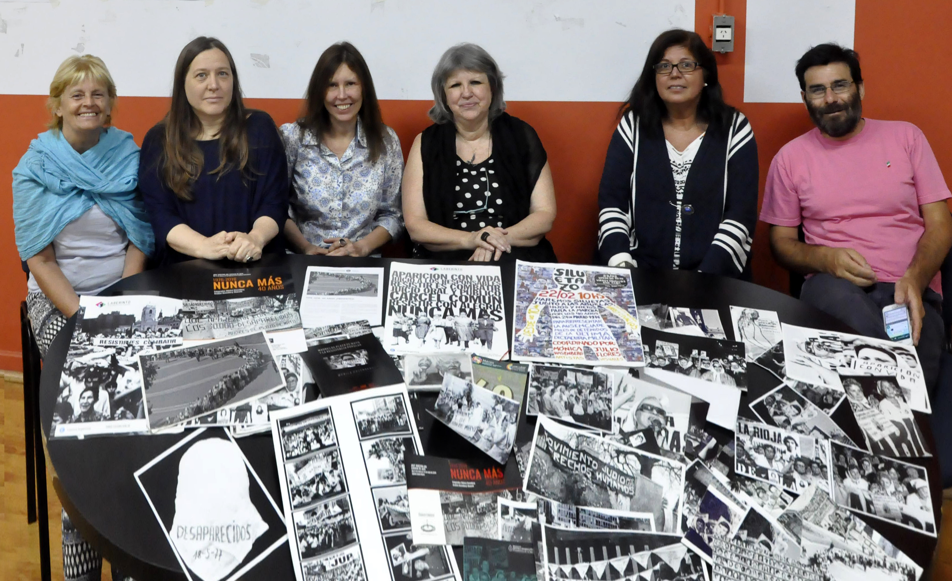 Otilia Entraigues, Silvia Gattafoni, María Rosa Mostaccio (Subsecretaria de Bibliotecas), Mónica Hasenberg, Eugenia Acosta y Jesús Emilio Monzón, equipo que colabora con la Subsecretaría de Bibliotecas para el ordenamiento, digitalización, clasificación y puesta en valor para su visibilización en el espacio virtual de Archivos de la Facultad de Filosofía y Letras de la UBA con el objetivo de conservación, preservación y difusión de nuestra memoria